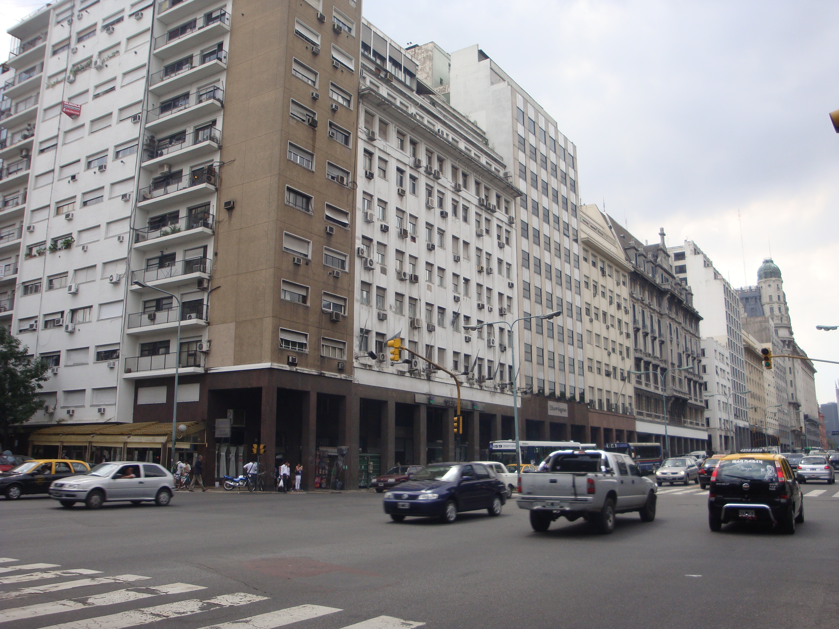 Intersección de la Avenida Paseo Colón y la Avenida Belgrano